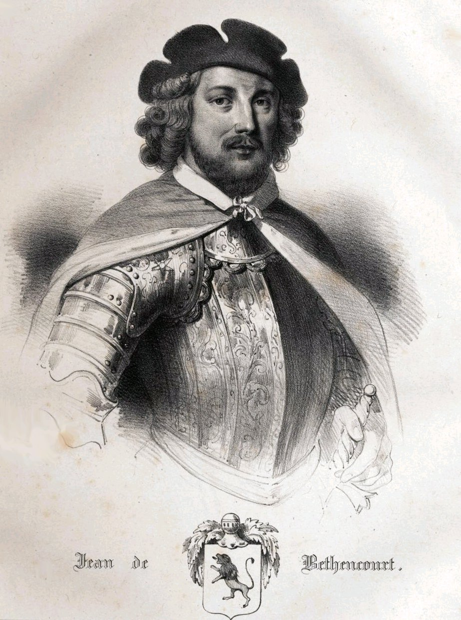 Portrait Jean de Béthencourt